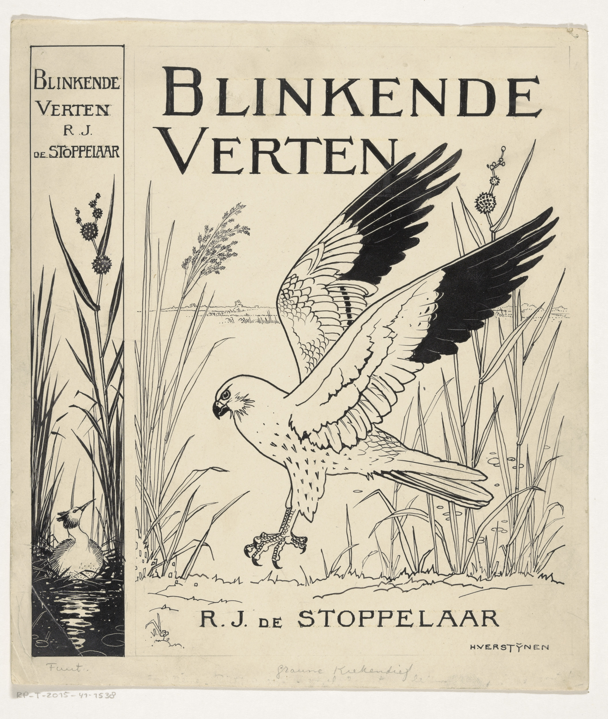 IdentificatieTitel(s): Bandontwerp voor: R.J. de Stoppelaar, Blinkende verten, 1930Objecttype: tekening boekband (ontwerp) Objectnummer: RP-T-2015-41-1538Opschriften / Merken: signatuur, recto, handgeschreven: ‘H. VERSTYNEN’annotatie, recto, handgeschreven: ‘Fuut. Grauwe Kiekendief’clichéaanwijzing, verso, handgeschrevenverzamelaarsmerk, verso, gestempeld: Lugt 2228Omschrijving: Een grauwe kiekendief landt aan een waterkant tussen het riet. Op de boekrug een fuut op een nest tussen de rietstengels.VervaardigingVervaardiger: tekenaar: Henri Verstijnen (eigenhandig gesigneerd)Datering: in of voor 1930Fysieke kenmerken: pen en penseel in zwart over potlood op papier opgeplakt op kartonMateriaal: karton papier inkt potlood Techniek: pen / penseel / plakkenAfmetingen: h 251 mm × b 219 mmOnderwerpWat: birdslandscapes with waters, waterscapes, seascapes (in the temperate zone)Verwerving en rechtenCredit line: Schenking van Uitgeverij L.J. VeenVerwerving: schenking 1970Copyright: Publiek domein